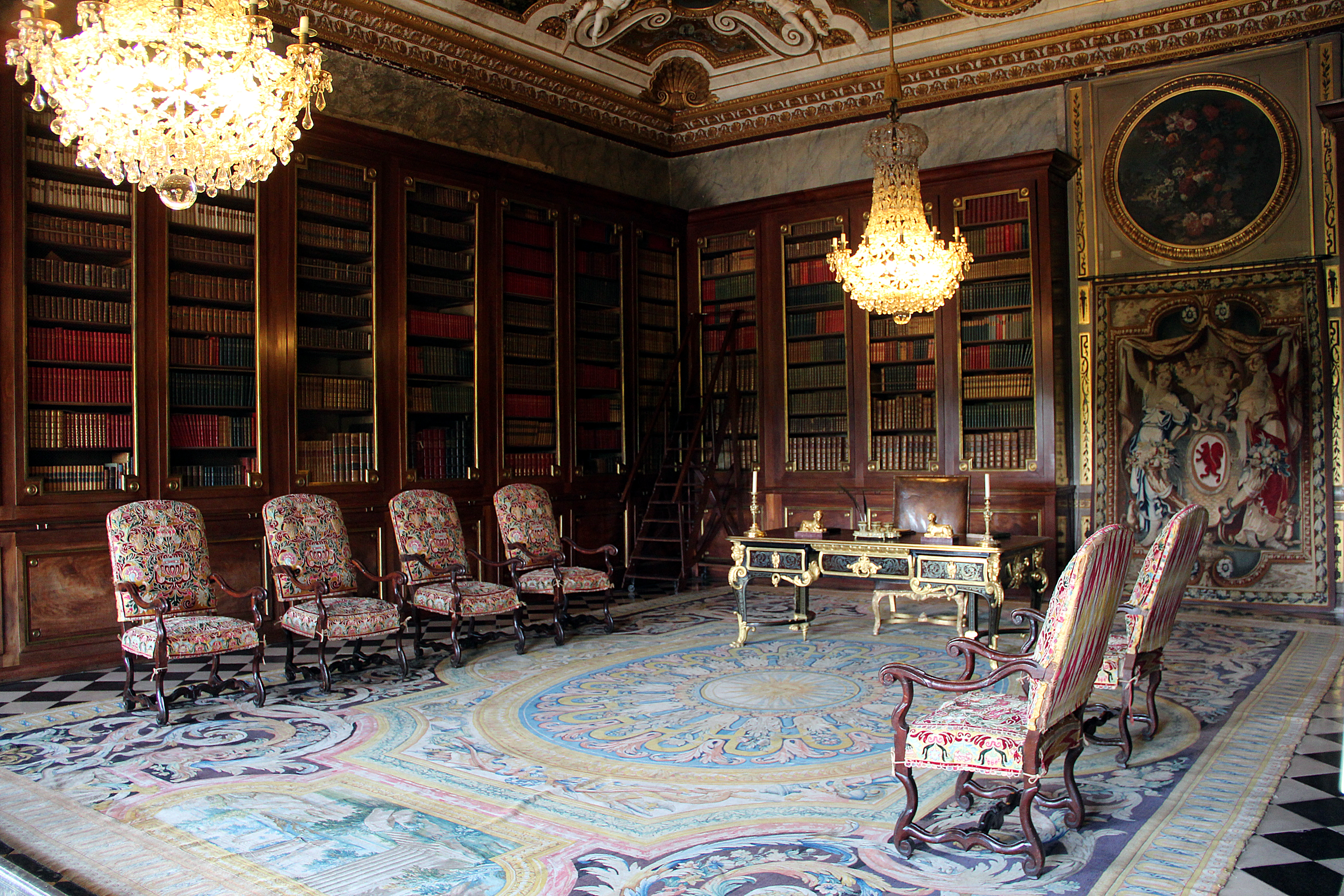 Bibliothèque de Nicolas Fouquet - Château de Vaux-le-Vicomte - Maincy (Seine-et-Marne, France).